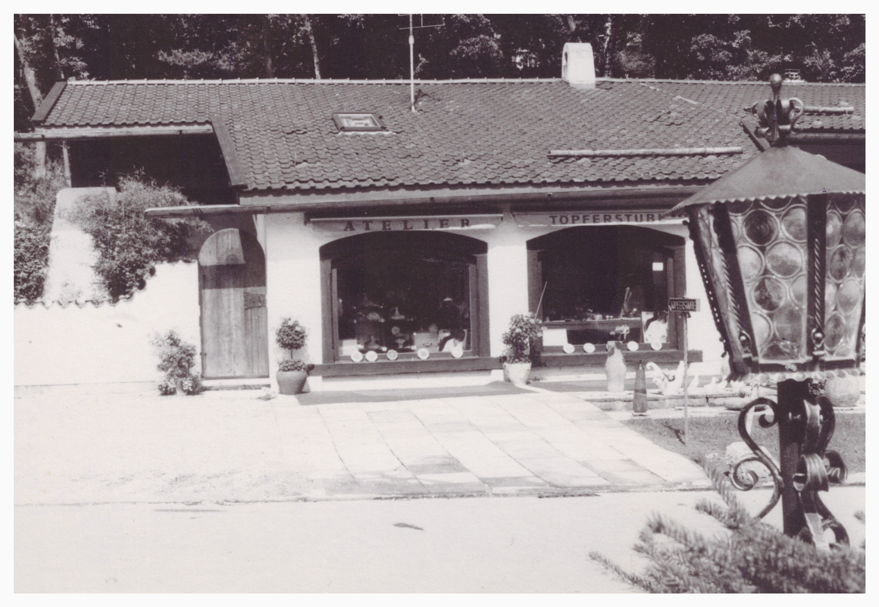 Neue Töpferstube / Atelier in Bad Wiessee um 1960